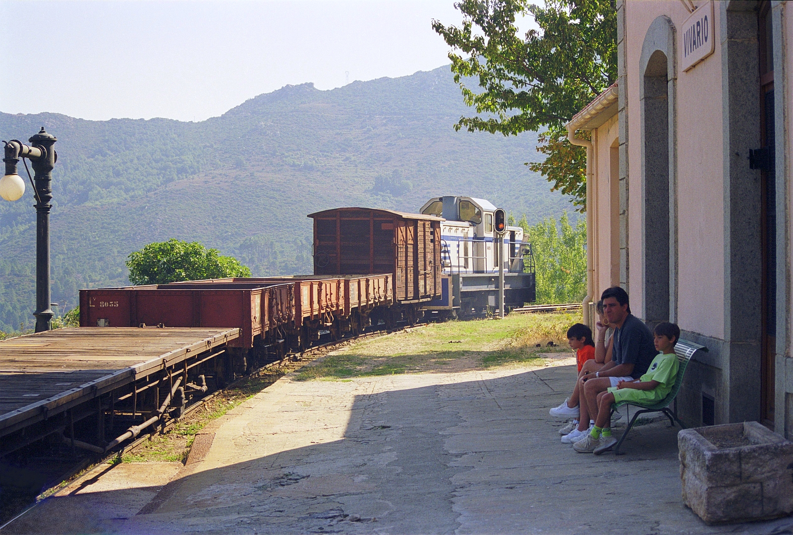 Le train de marchandises Ajaccio-Bastia passe en gare de Vivario le 18 août 2000.